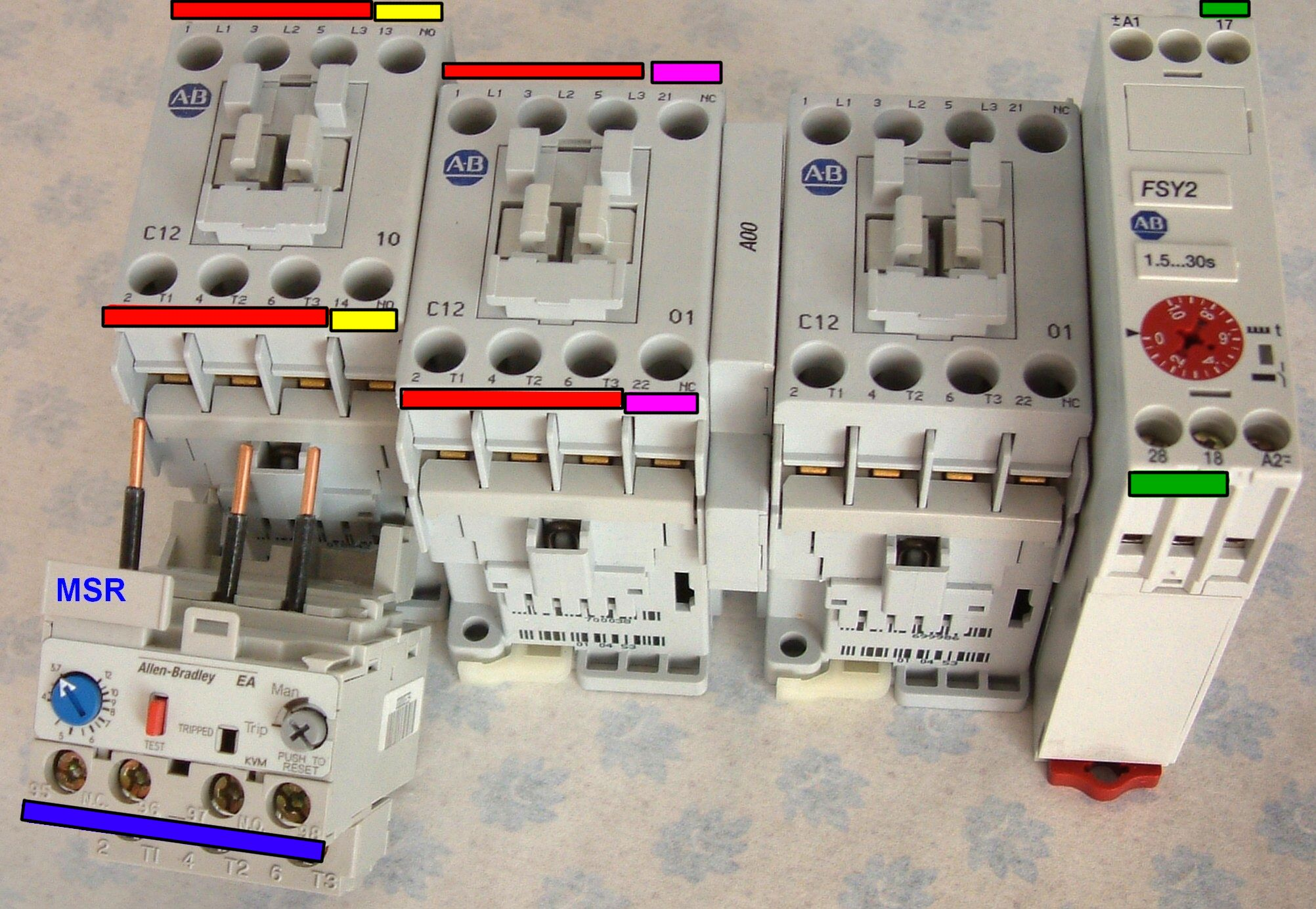 Schützen für Stern - Dreieck MOTORSTARTER mit mechanischer Verriegelung (A00) Motorschutzrelais (unten links) und Zeitrelais (ganz rechts) die Klemmennummern sind gut sichtbar.